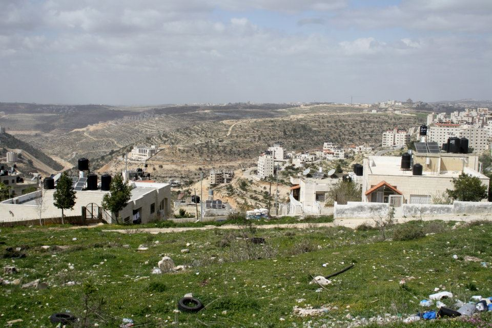 View of the Judean Hills from Ramallah